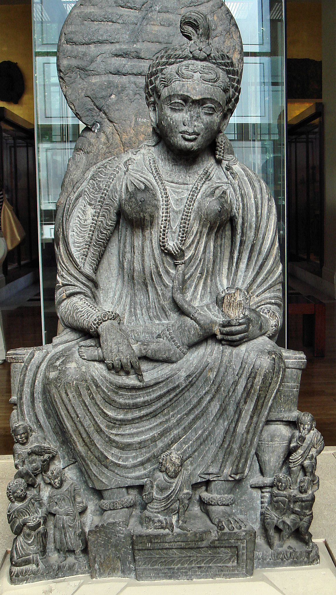 Goddess Hariri With Baby